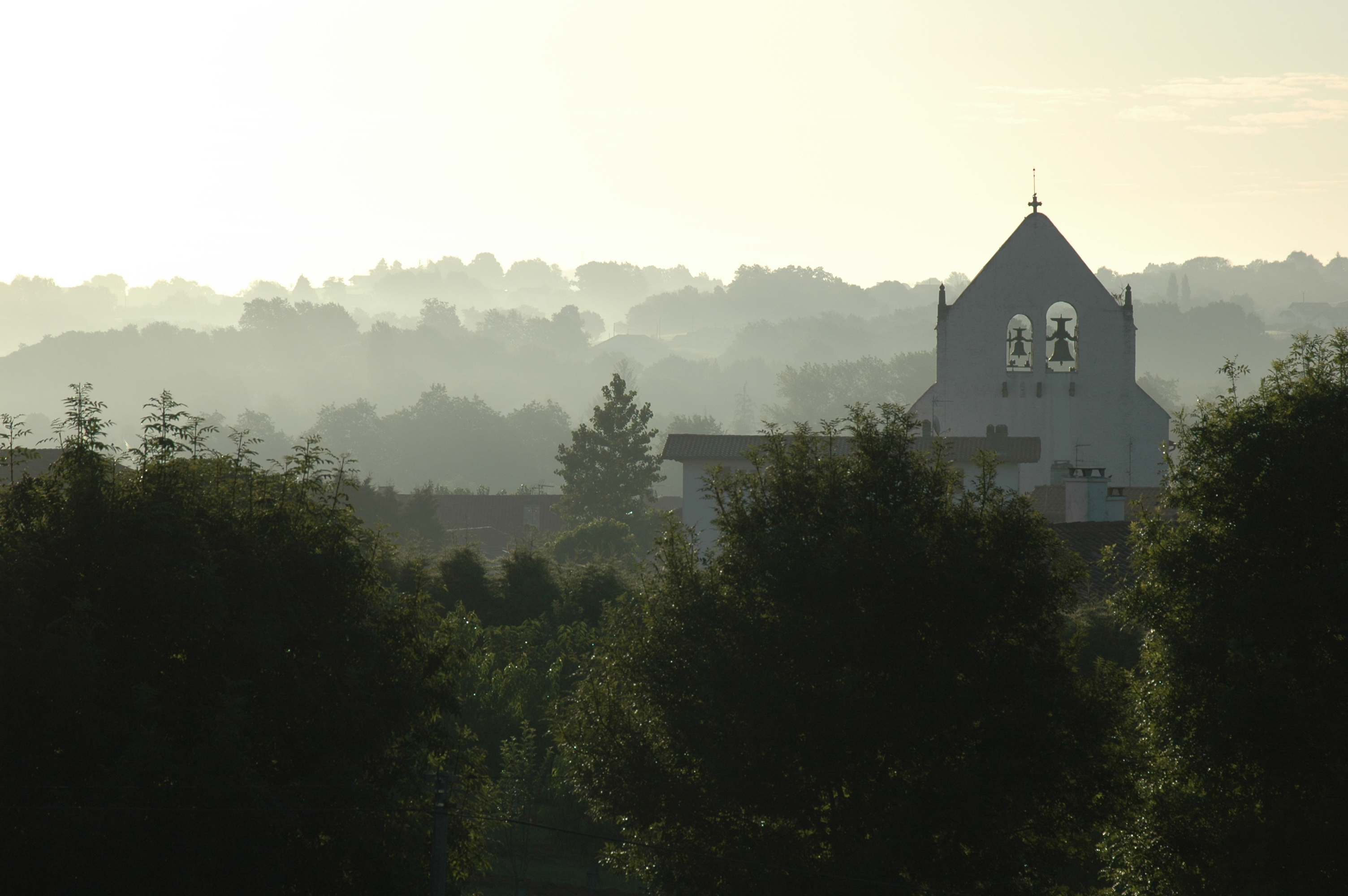 Lever de soleil sur Ahetze